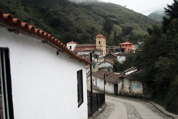 Vista de una de las calles principales del pueblo de Piñango, con vista a la iglesia y la plaza Bolívar.